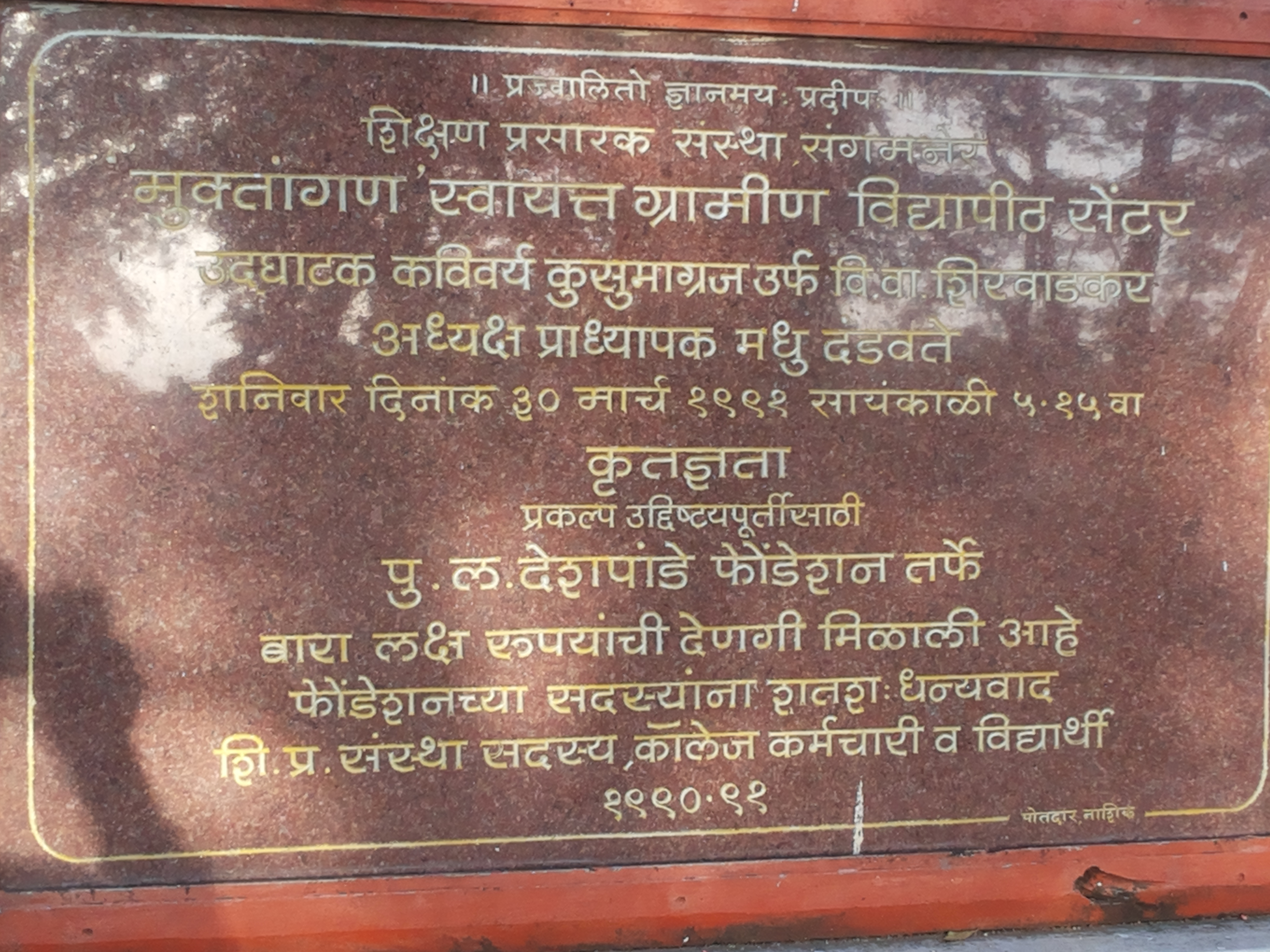 पु.ल. देशपांडे प्रतिष्ठान देणगी कोनशिला समारंभ